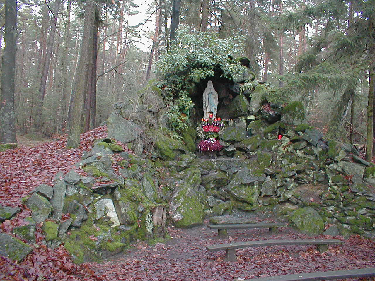 Mariengrotte im Obernauer Wald, errichtet vom Krieger- und Veteranen-Verein Obernau 1886